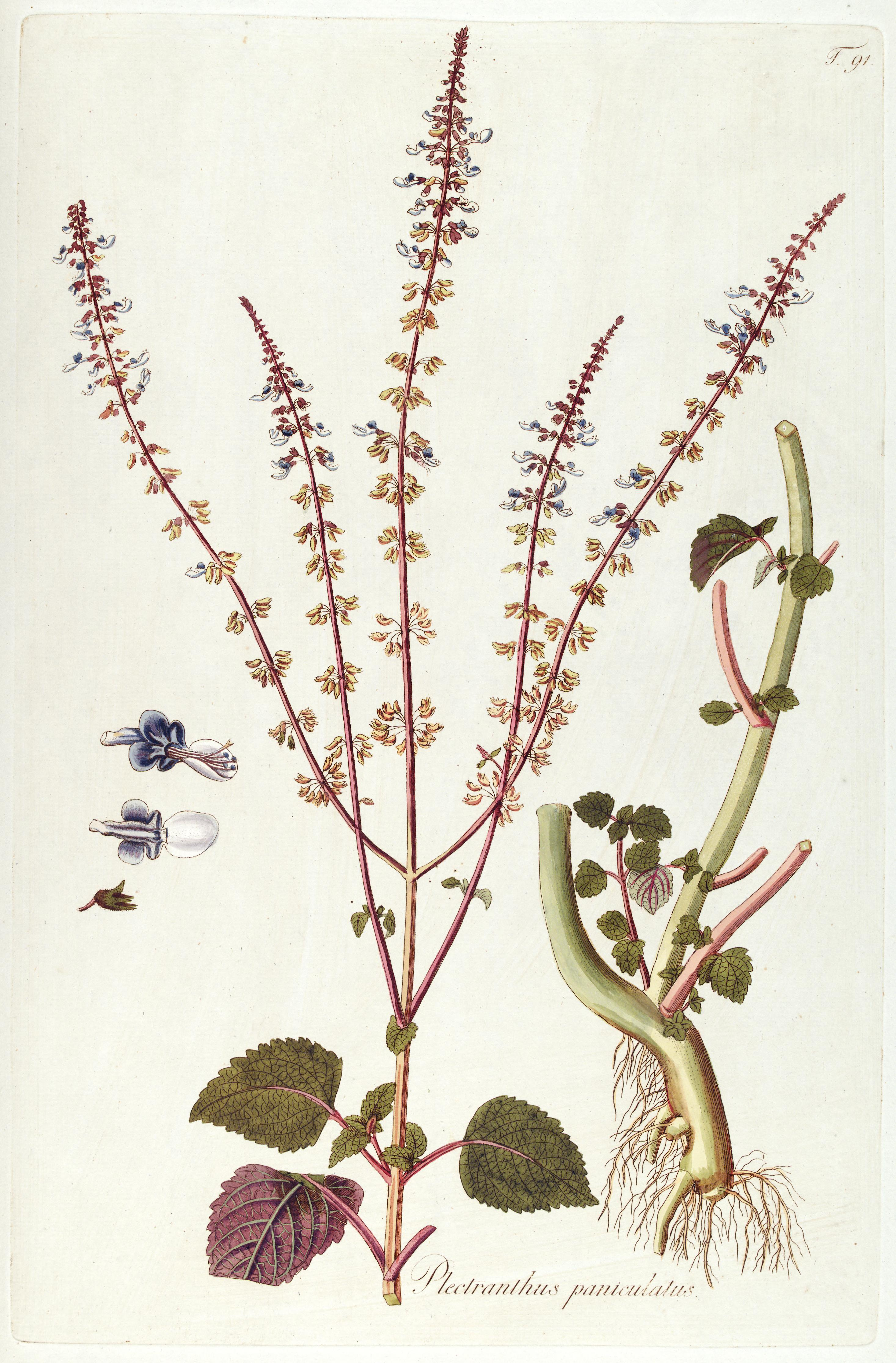 Fragmenta botanica, figuris coloratis illustrata :ab anno 1800 ad annum 1809 per sex fasciculos edita /opera et sumptibus Nicolai Josephi Jacquin.